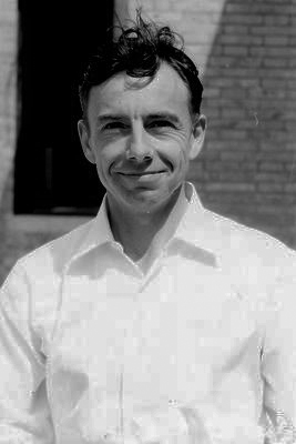 Foto di Jean-Louis Koszul